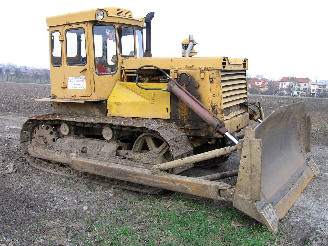 ČTZ buldozer in Czech republic